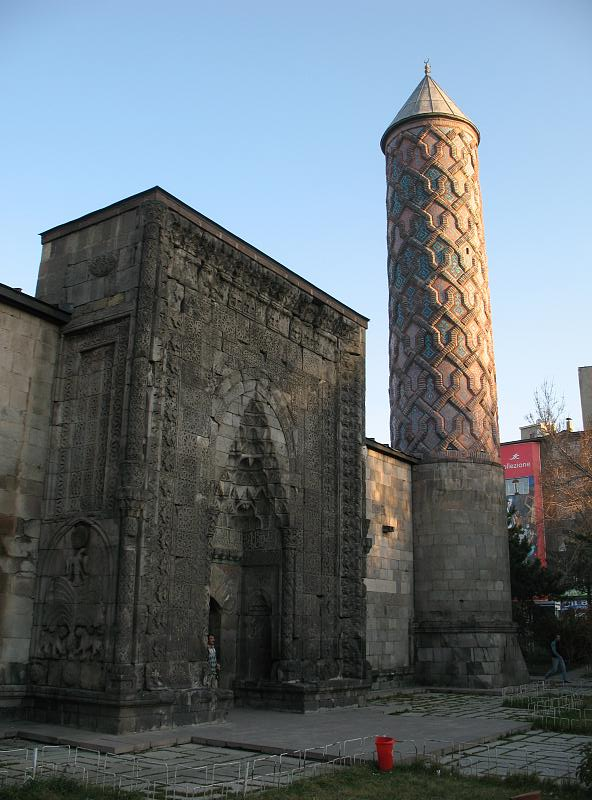 De Yakutiye Medrese, gebouwd in 1310 als Mongoolse theologische school, heeft een schitterend mooie minaret met mozaïeken. Wordt nu gebruikt als etnografisch museum.